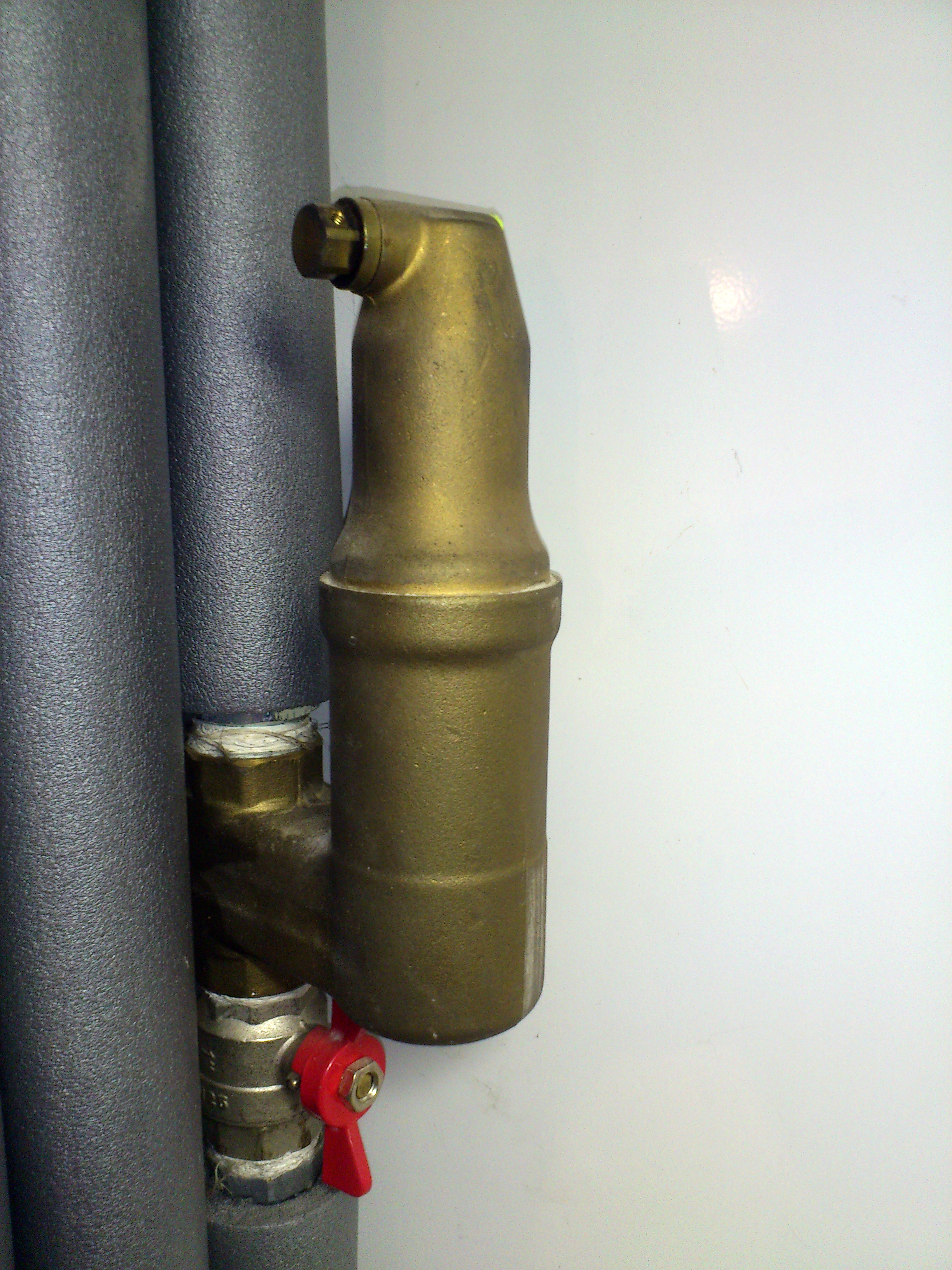 Séparateur d'air IMI Zeparo ZU.